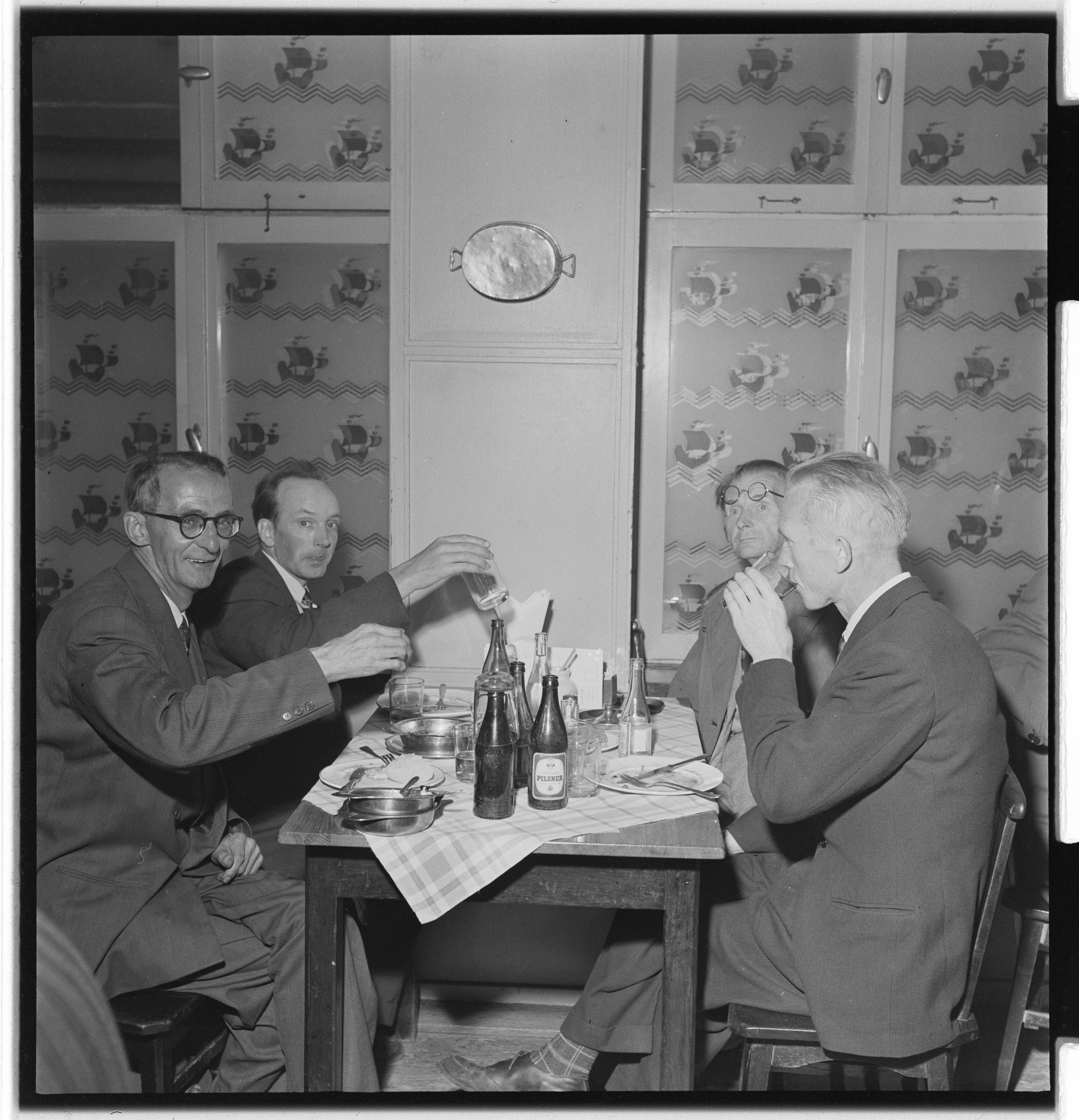 Bildet er hentet fra Arkivverket. Frigjøring av brennevin i Sverige Arkivinstitusjon : Riksarkivet Arkivnavn : Billedbladet NÅ Sted : Sverige, Ukjent, Ukjent, Emneord: alkohol, brennevin Avbildet